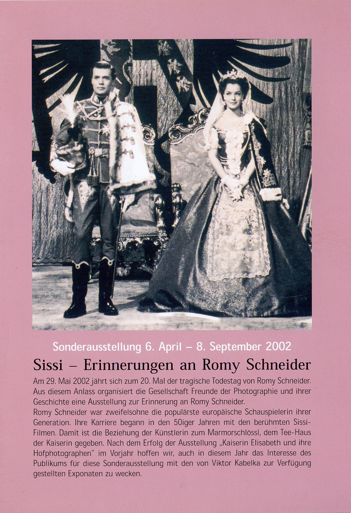 Romy Schneider u. Karl Heinz Böhm als Elisabeth von Österreich-Ungarn (Sissi) und Franz Josef im Film Sissi